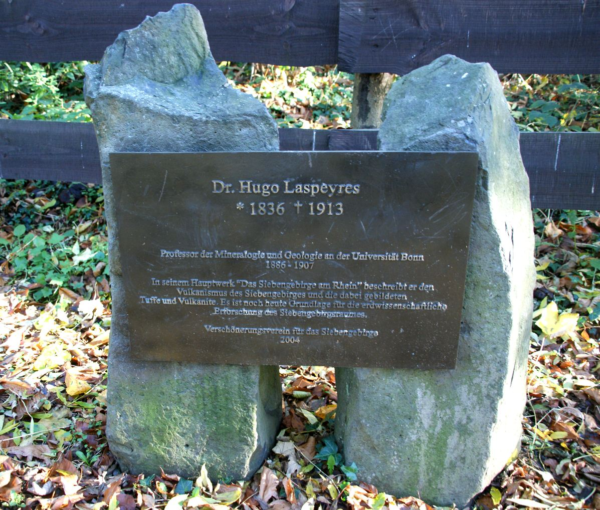 Hugo Laspeyres – Gedenkplakette (2004) von Sigrid Winzel am Weilberg für das Siebengebirge